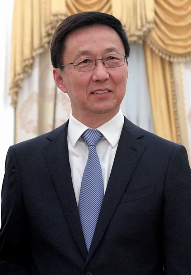 Первый заместитель Премьера Государственного совета Китайской Народной Республики Хань Чжэн во время встречи с Президентом Российской Федерации Владимиром Путиным